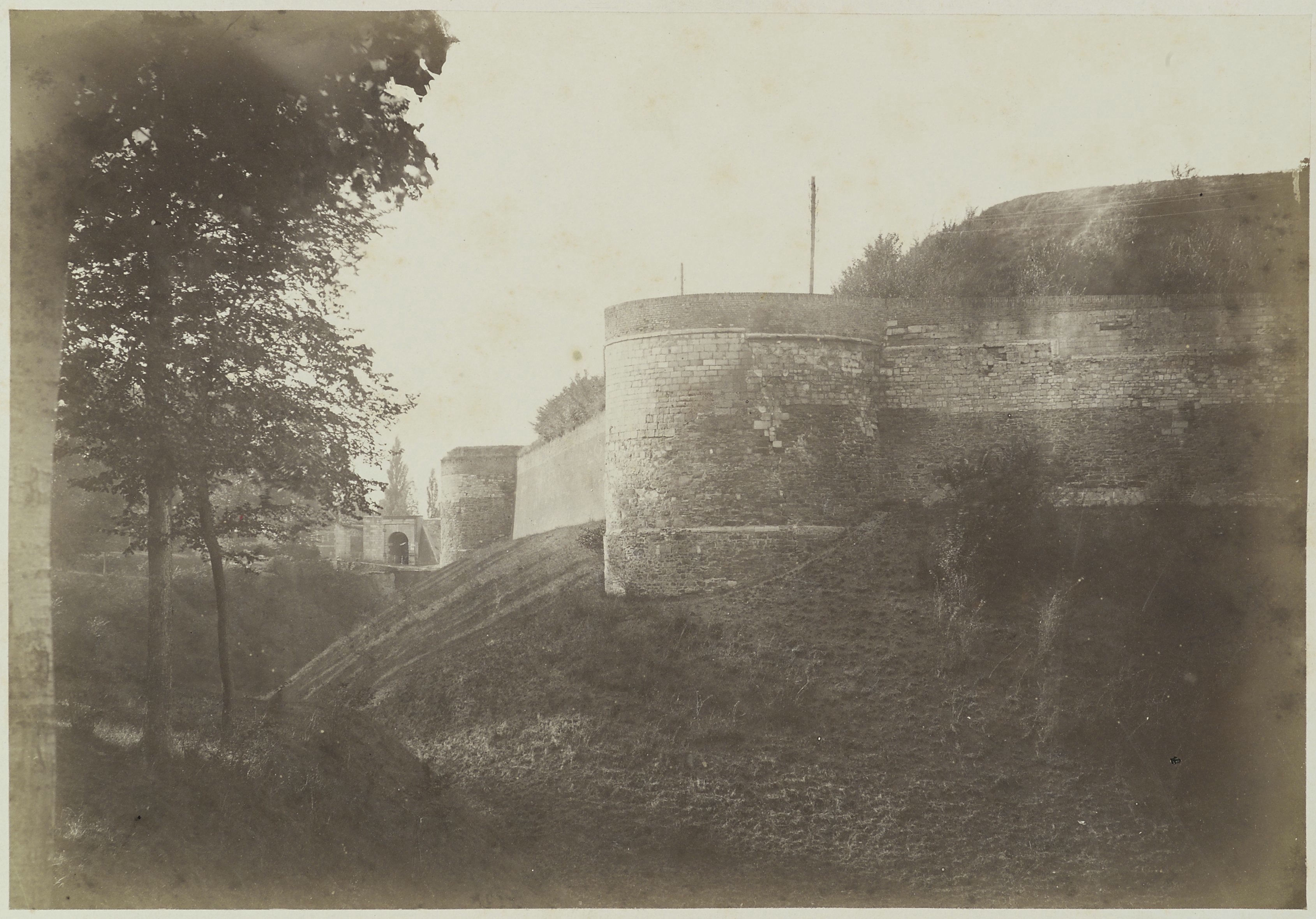 Maastricht: Zicht op de middeleeuwse stadsmuur, de Brusselsepoort en de kat Brandenburg (binnen de stadsmuur) tijdens de sloop in juli 1868 (opmerking: foto door Theodor Weijnen, uit reeks Ontmanteling van Maastricht)